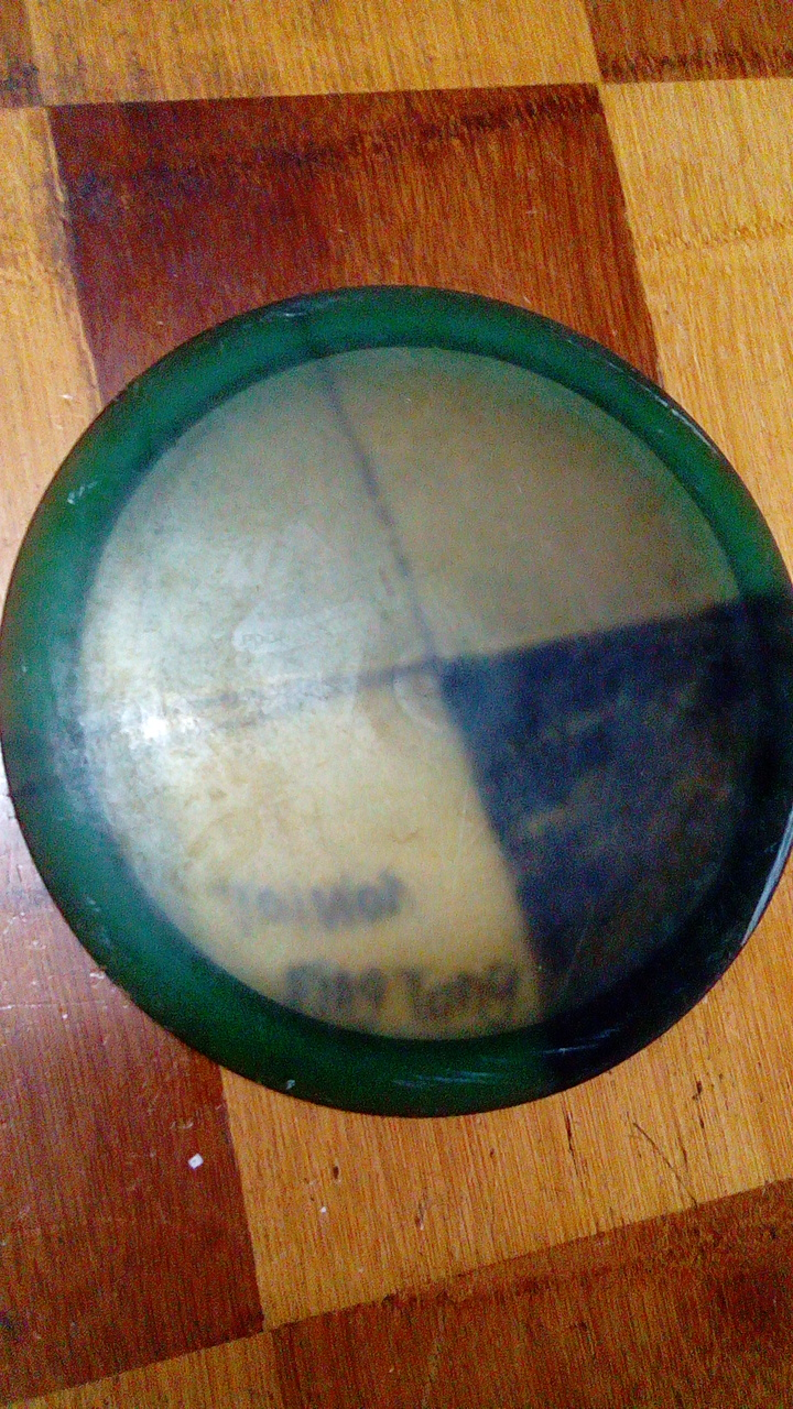 同上